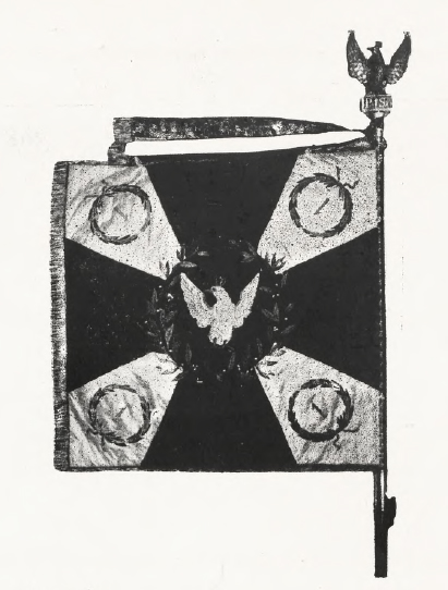 lewa strona sztandaru 1 pułku saperów